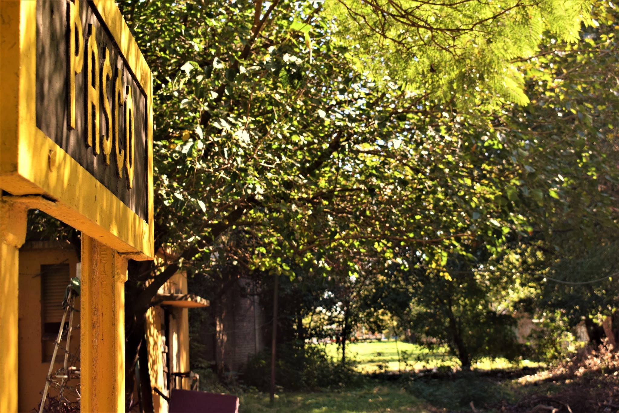 parada apeadero PASCO